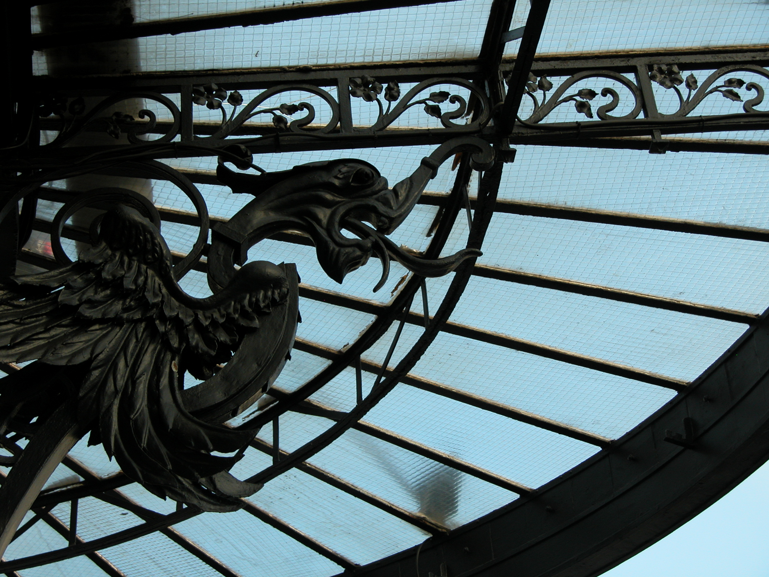 Marquise Brasserie des Brotteaux